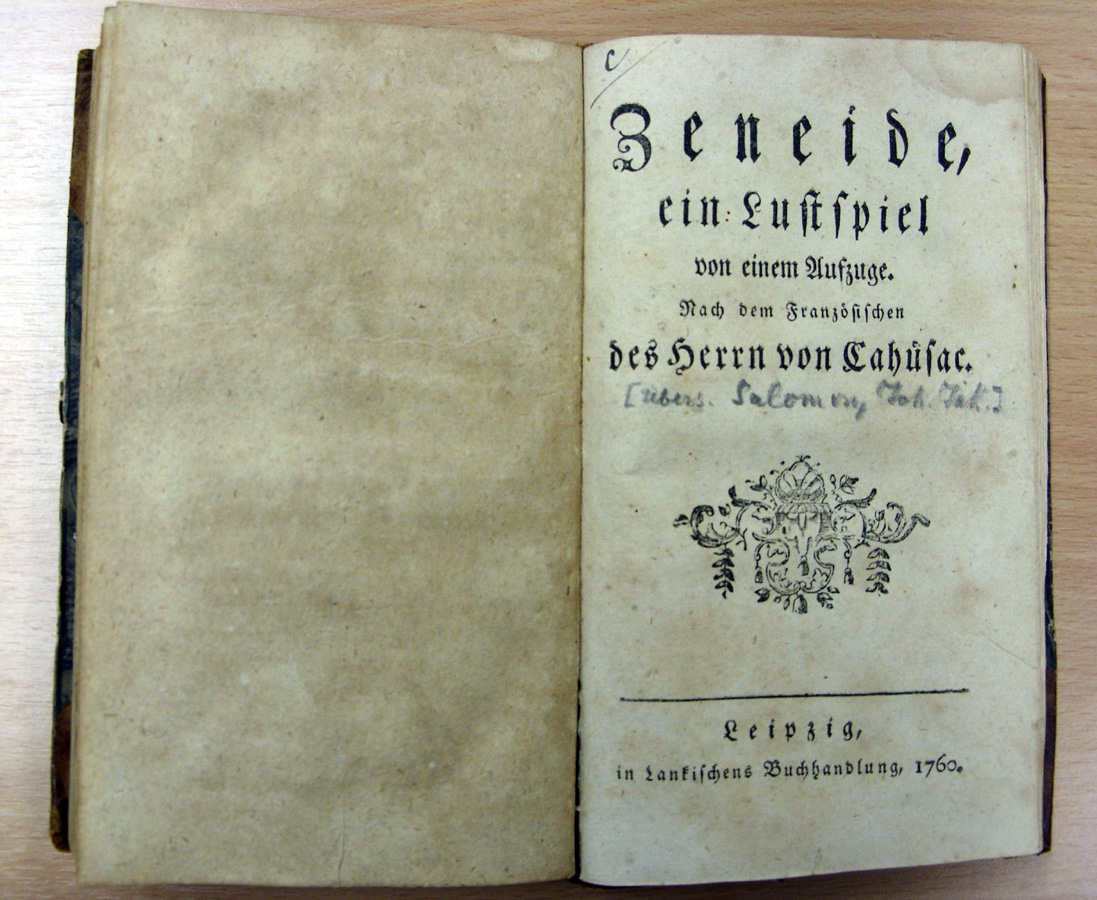 Zeneide, ein Lustspiel von einem Aufzuge. Nach dem Französischen des Herrn von Cahüsac, Leipzig, in Lankischens Buchhandlung, 1760 (hier: Titelkupfer)